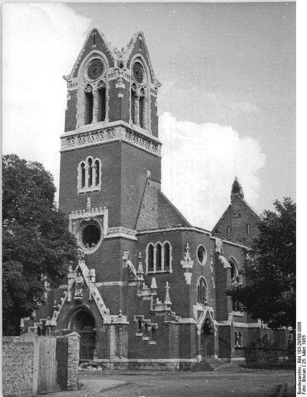 Zentralbild-Biscan Wjt-Qu 7 Mot. 25.3.1955 Die evangelische Martini-Kirche in Magdeburg-Neustadt Diese Kirche, 1902 erbaut, war die jüngste Kirche der Stadt, als sie im Januar 1945 durch Brandbomben zerstört wurde. In der Bombennacht stürzte die Turmspitze ein. Der Glockenstuhl wurde wieder instandgesetzt und die Glocke wieder in Benutzung genommen.